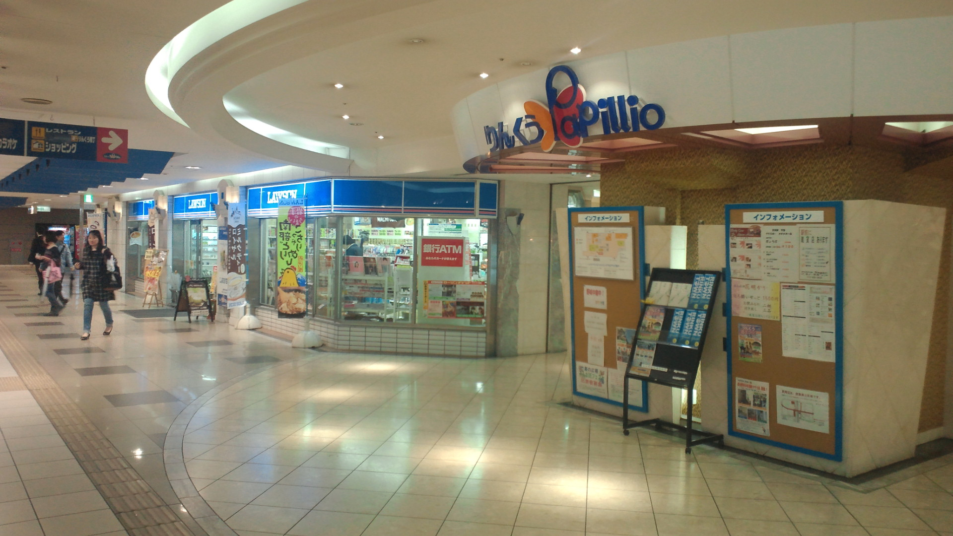 りんくうPapillio構内